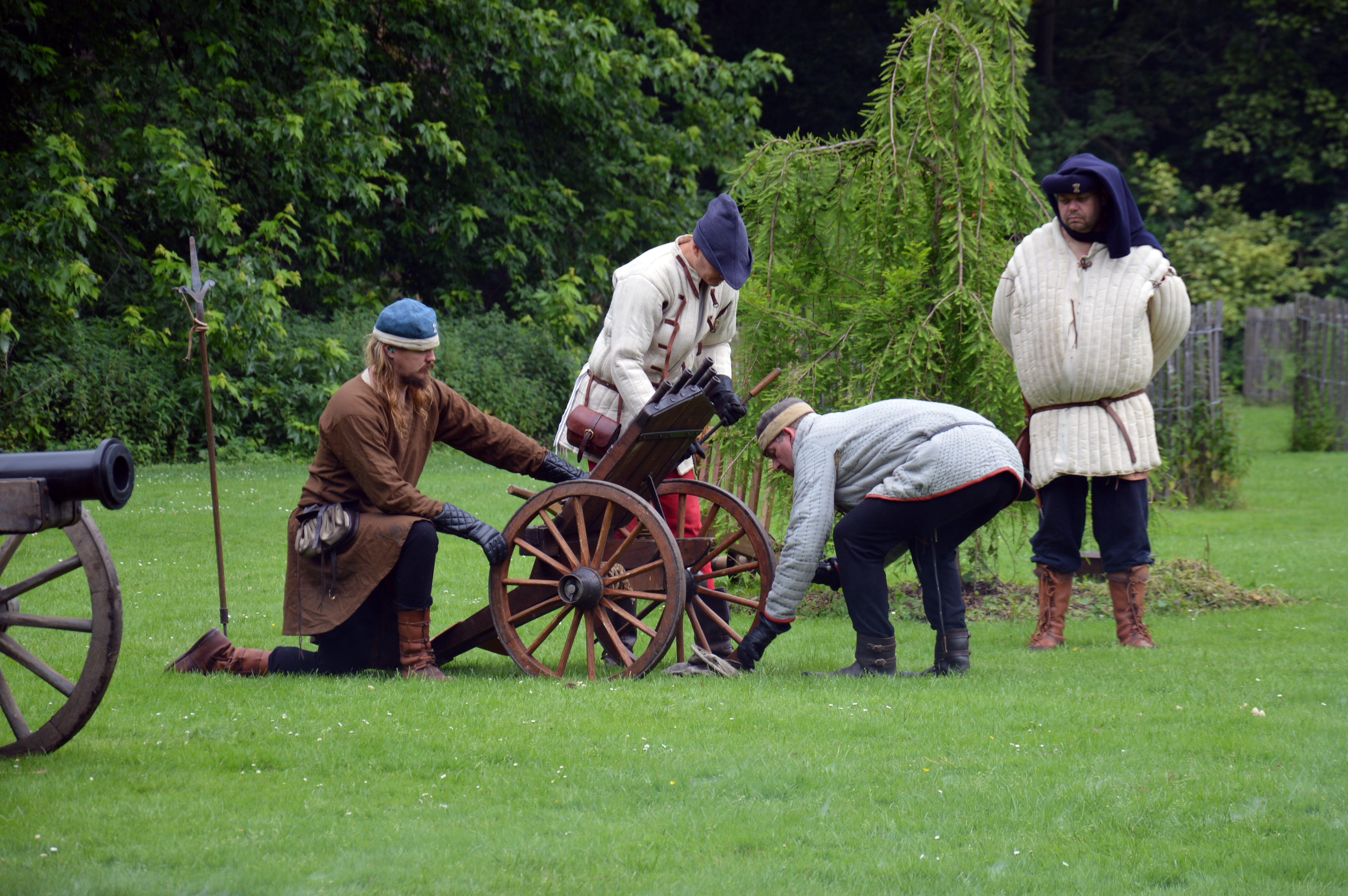 Re-enactment tijdens De Quaeye Werelt 2018